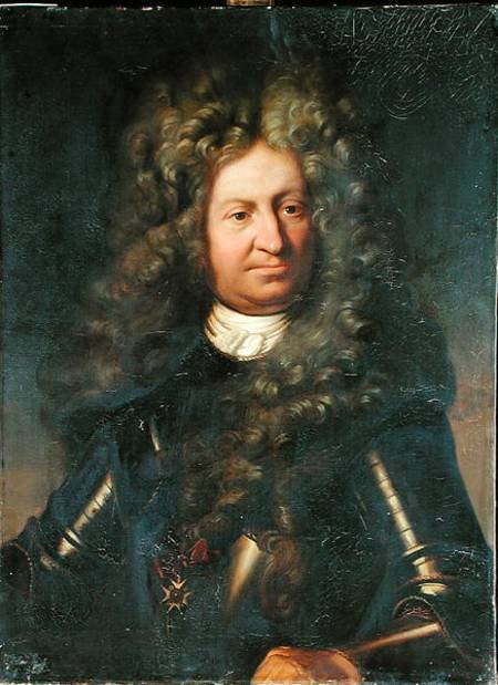 " Portrait de Jean Bart, chef d'escadre (1650-1702) " Huile sur Toile, 1840; Dim; H:81cm X L:60cm (Musée du Château de Versailles et Trianon) N°inv:MV3610